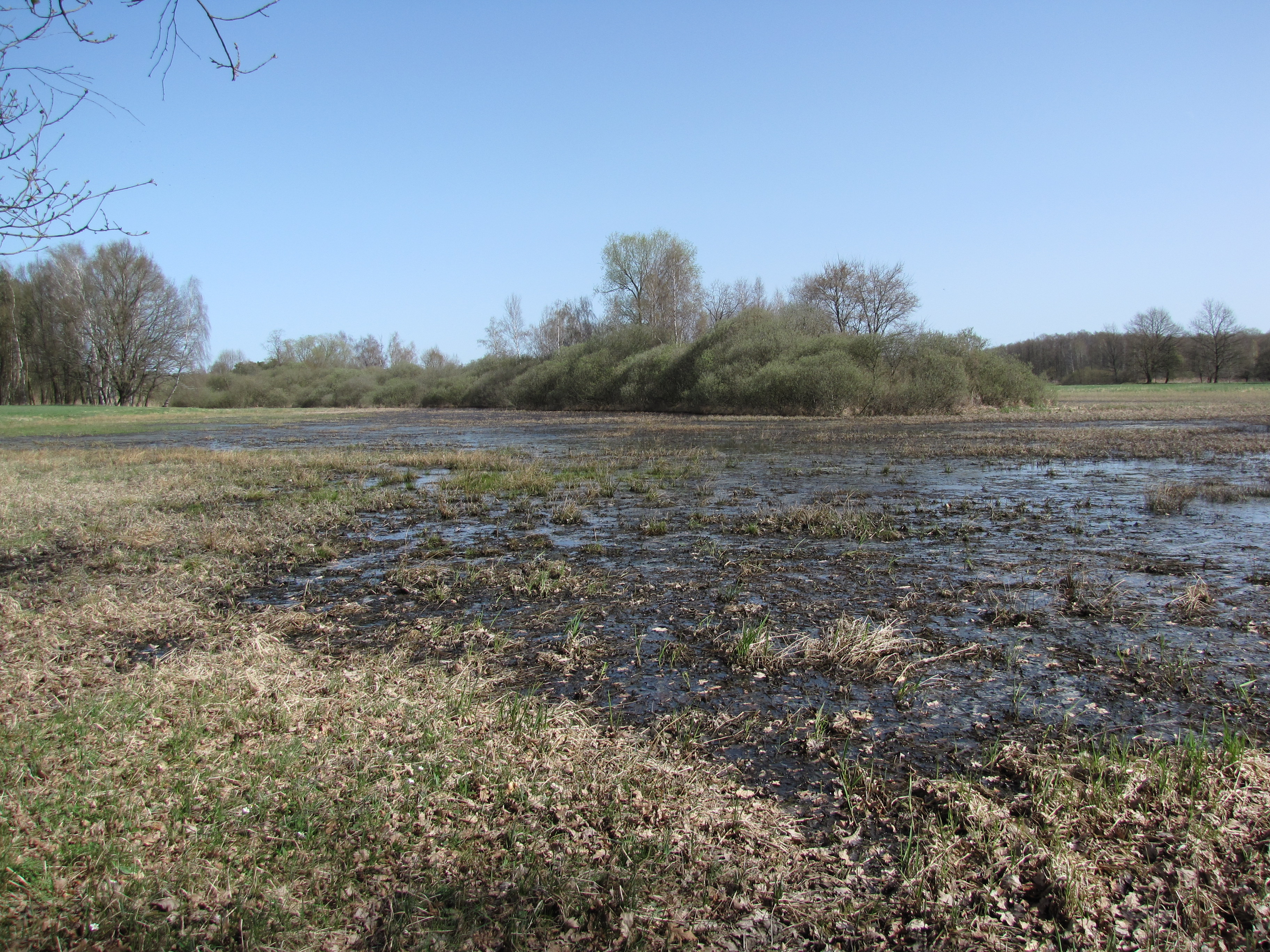 Morastige Wiese im Naturschutzgebiet Gadsdorfer Torfstiche und Luderbusch, nördlich von Gadsdorf, Gem. Am Mellensee, Landkreis Teltow-Fläming, Brandenburg, Deutschland